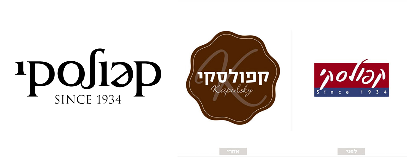 קפולסקי לוגו חדש